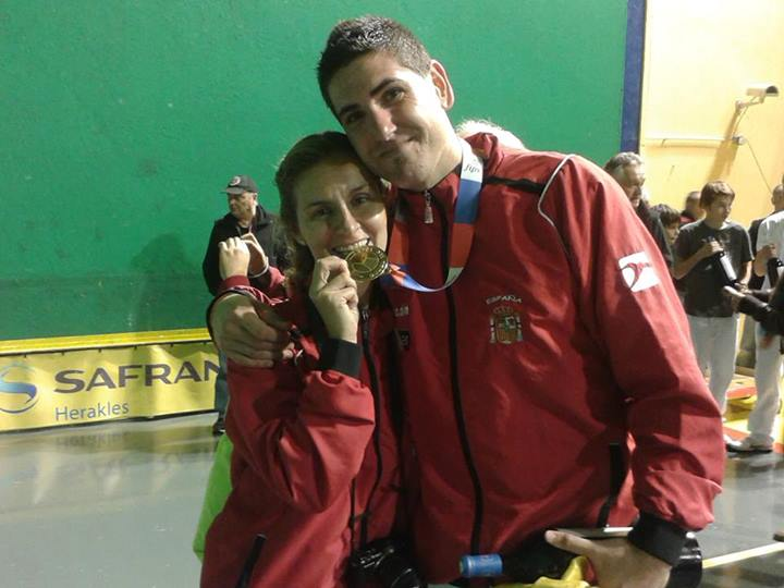 seleccion española